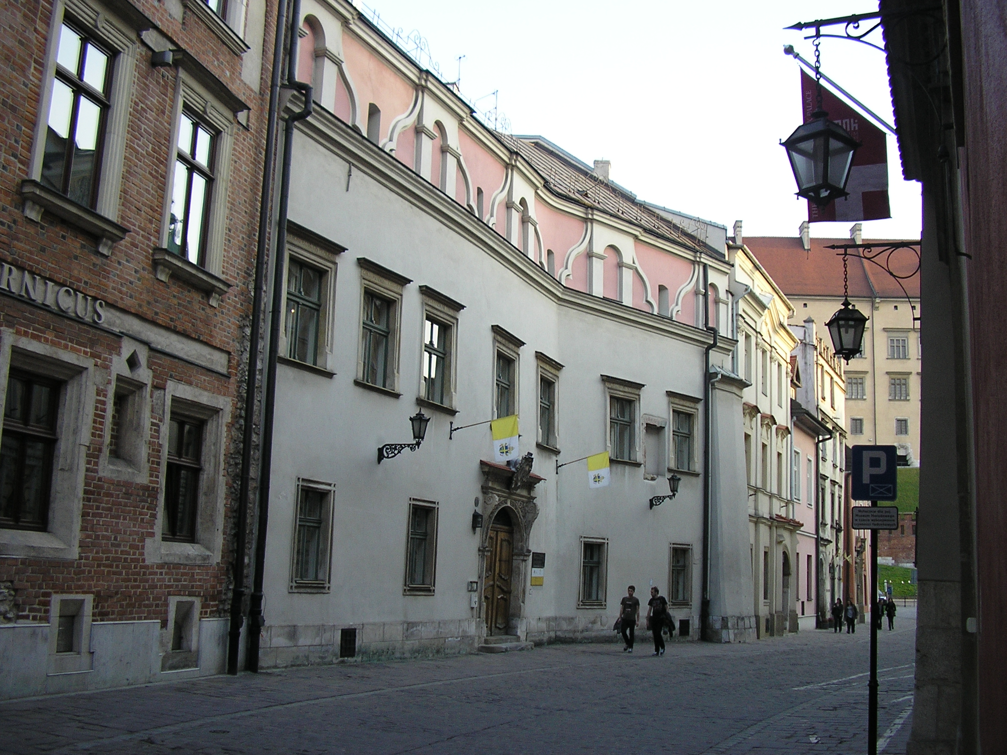 Pałac biskupa Floriana z Mokrska w Krakowie. Kanonicza 18